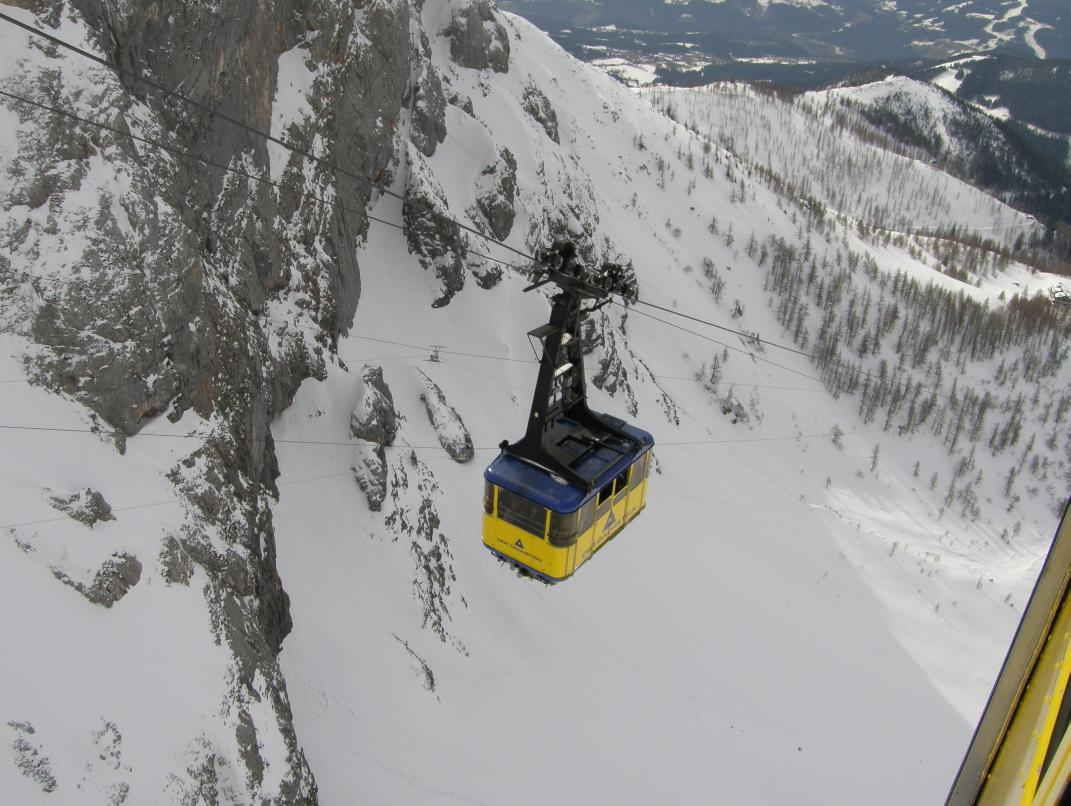 Dachstein, Seilbahn, kolejka linowa